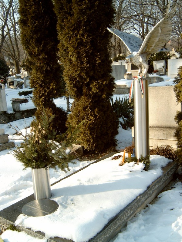 Bozay Attila sírja Budapesten. Farkasréti temető: 25-5-23.